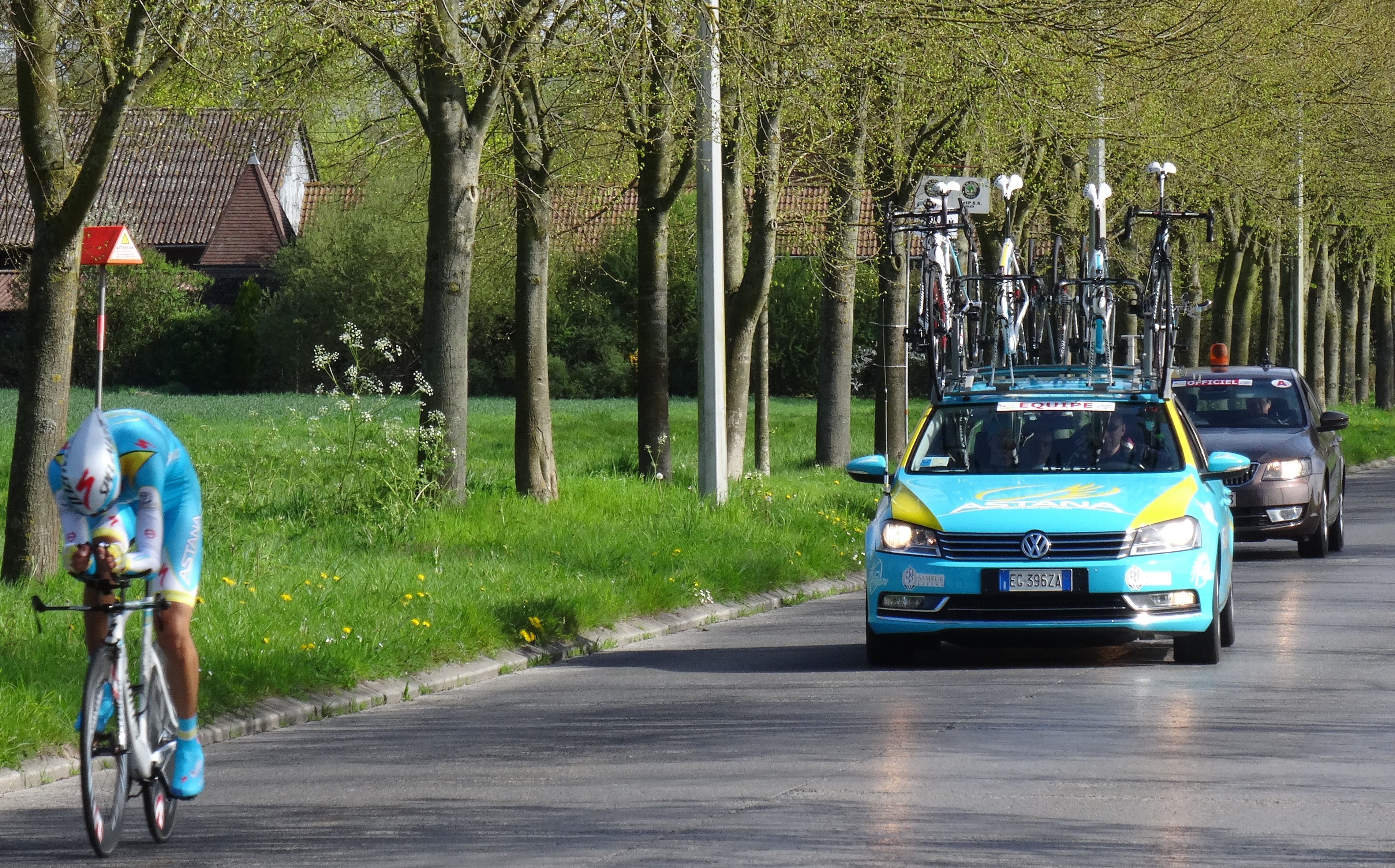 Triptyque des Monts et Châteaux 2014, étape 2a, 5 avril 2014, contre-la-montre individuel à Bernissart. Depicted person: Zhandos Bizhigitov Depicted team: Astana Continental The creation of these files was made possible thanks to the organizers of the Triptyque des Monts et Châteaux 2014 English | français | +/−